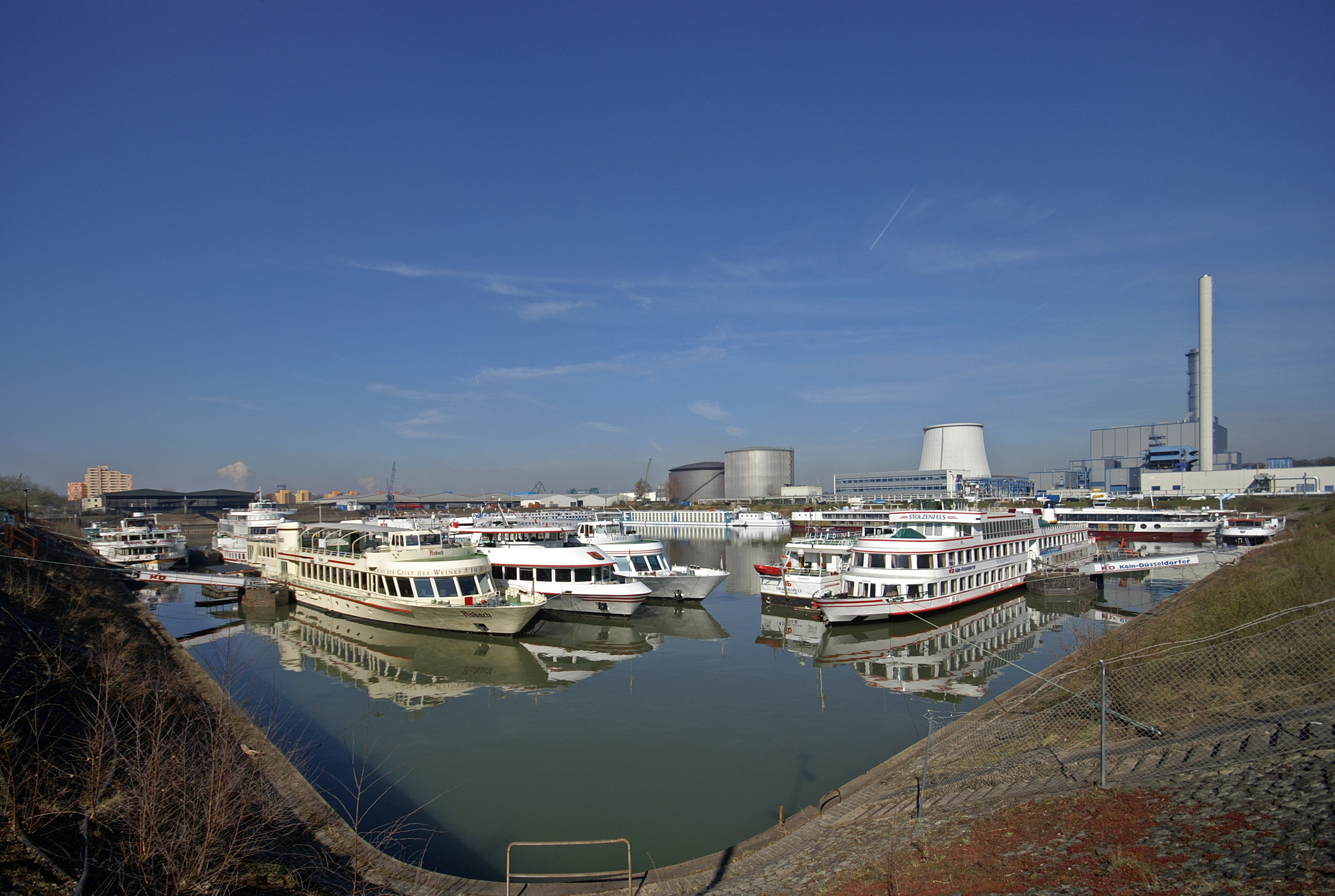 Das größte Becken im Hafen Niehl I in Köln, wird als Winterhafen für die Schiffe der Köln-Düsseldorfer genutzt. Hier werden neben den eigenen Schiffen auch die Flusskreuzfahrtschiffe der Premicon AG gewartet.